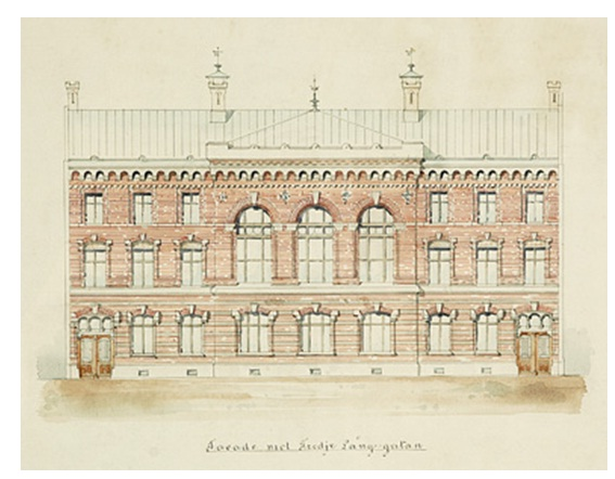 Göteborgs Auktionsverk, fasad mot Tredje Långgatan.